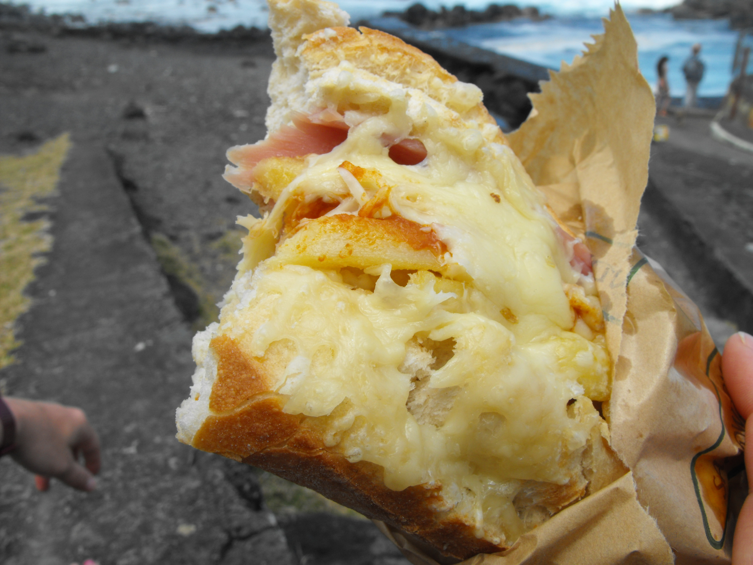 Der landestypische Imbiss Mitraillette in der überbackenen Variante mit Schinken auf La Réunion (Le Puit des Anglais)